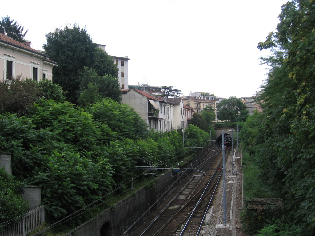 La ferrovia Milano-Chiasso subito fuori dal tunnel che sottopassa il centro di Monza